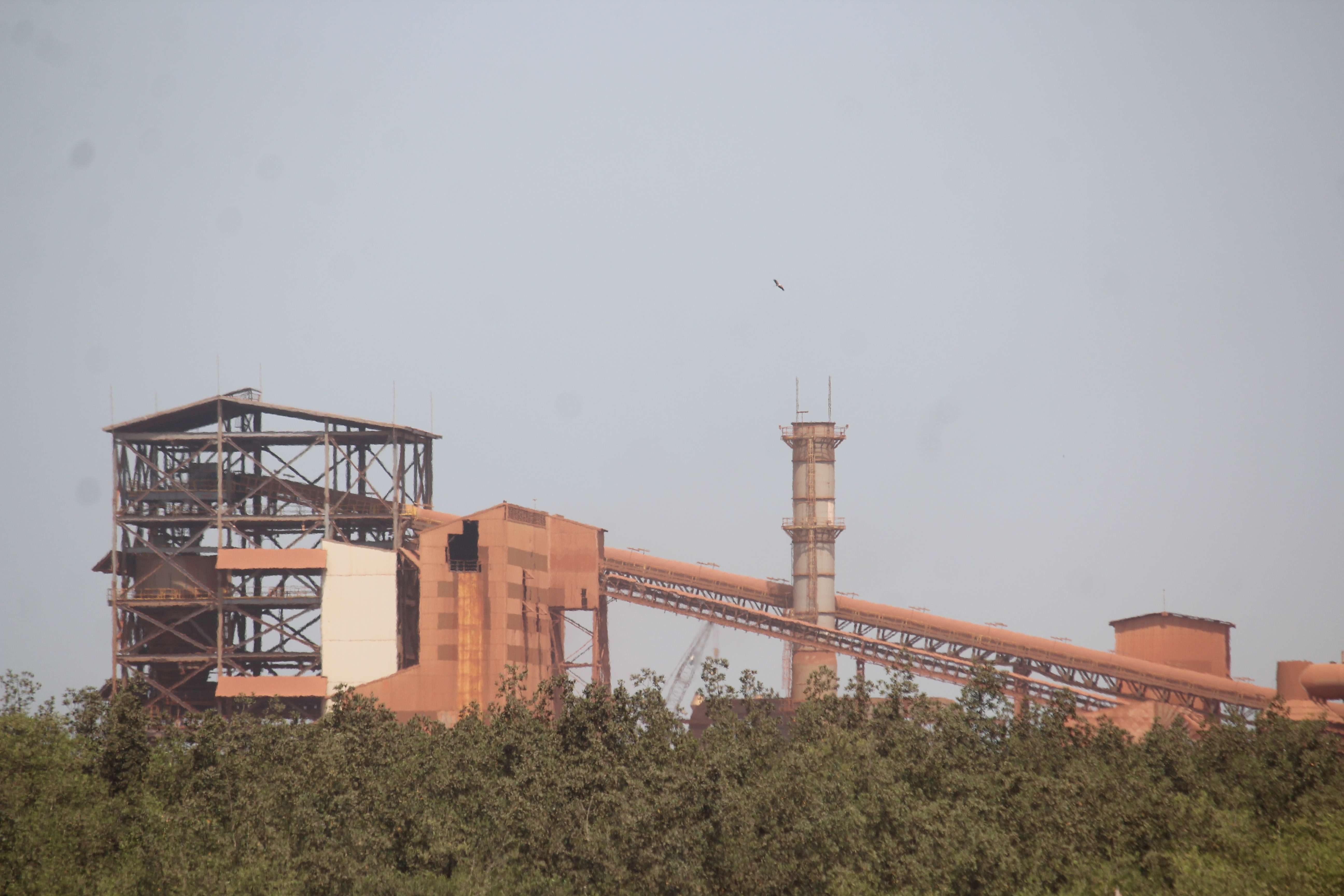 Vue de la CBG a kamsar This is an image with the theme "Africa on the Move or Transport" from: Guinea